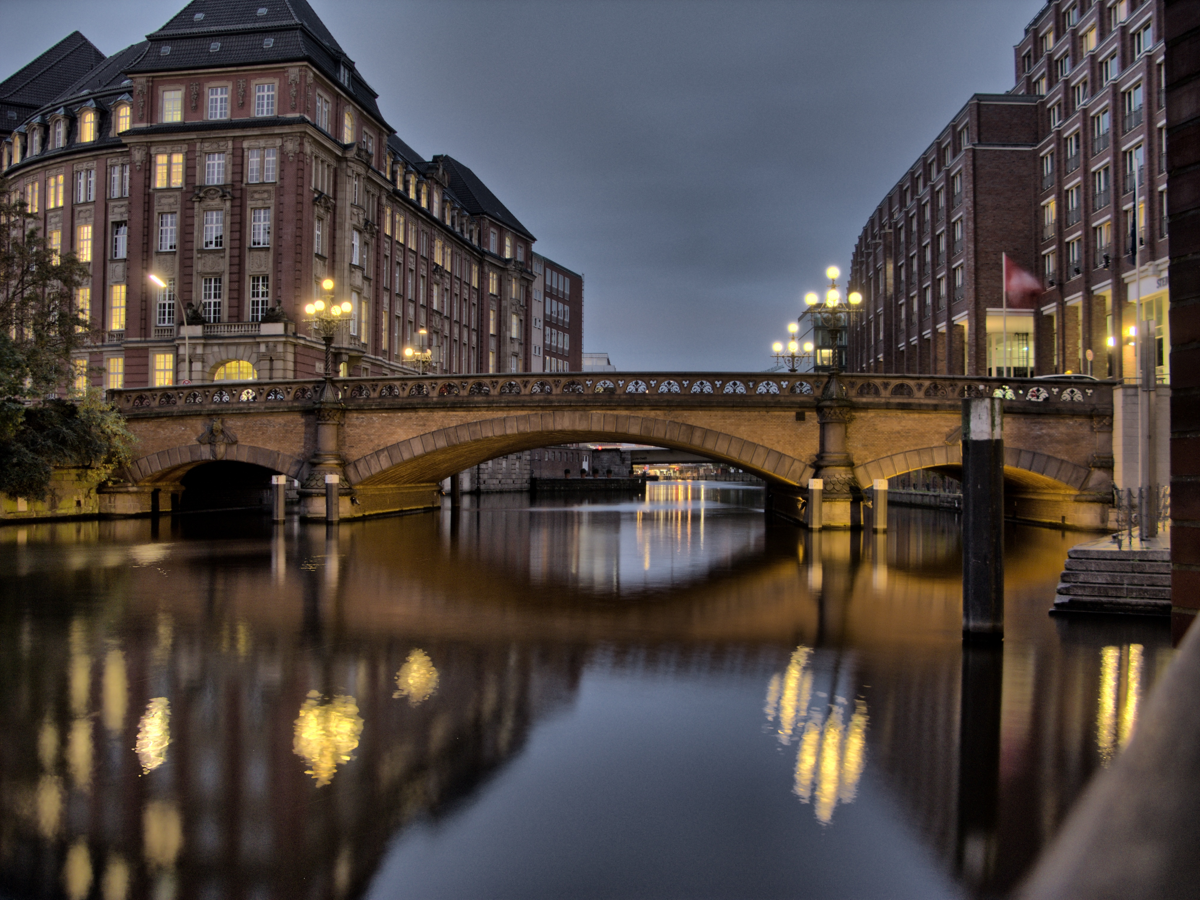 Heiligengeistbrücke vor dem Steigenberger Hotel, Hamburg.